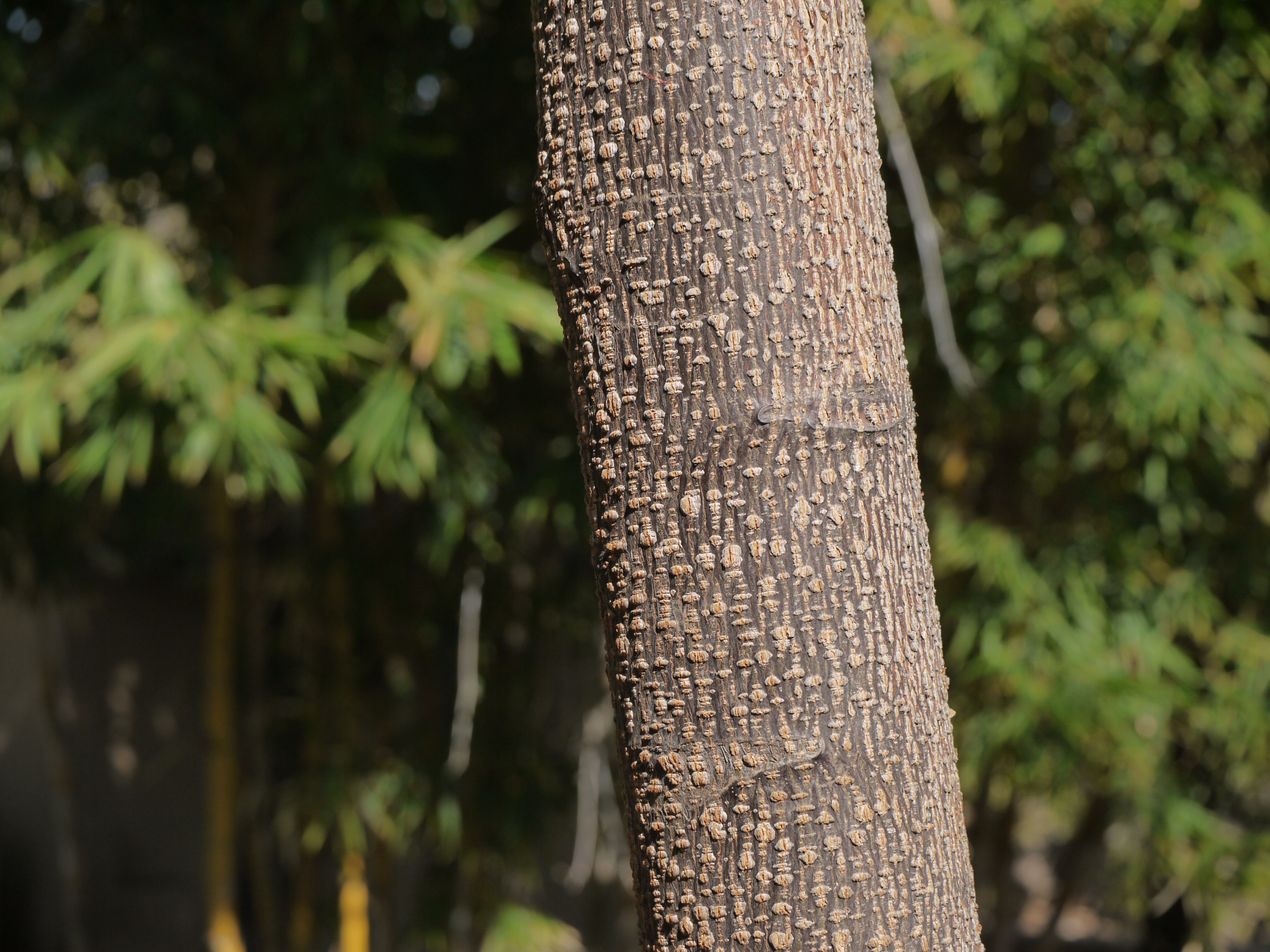 Melia dubia